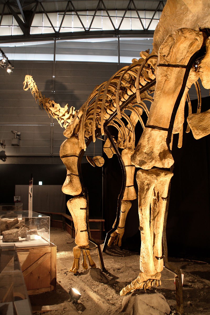 Huabeisaurus - 03